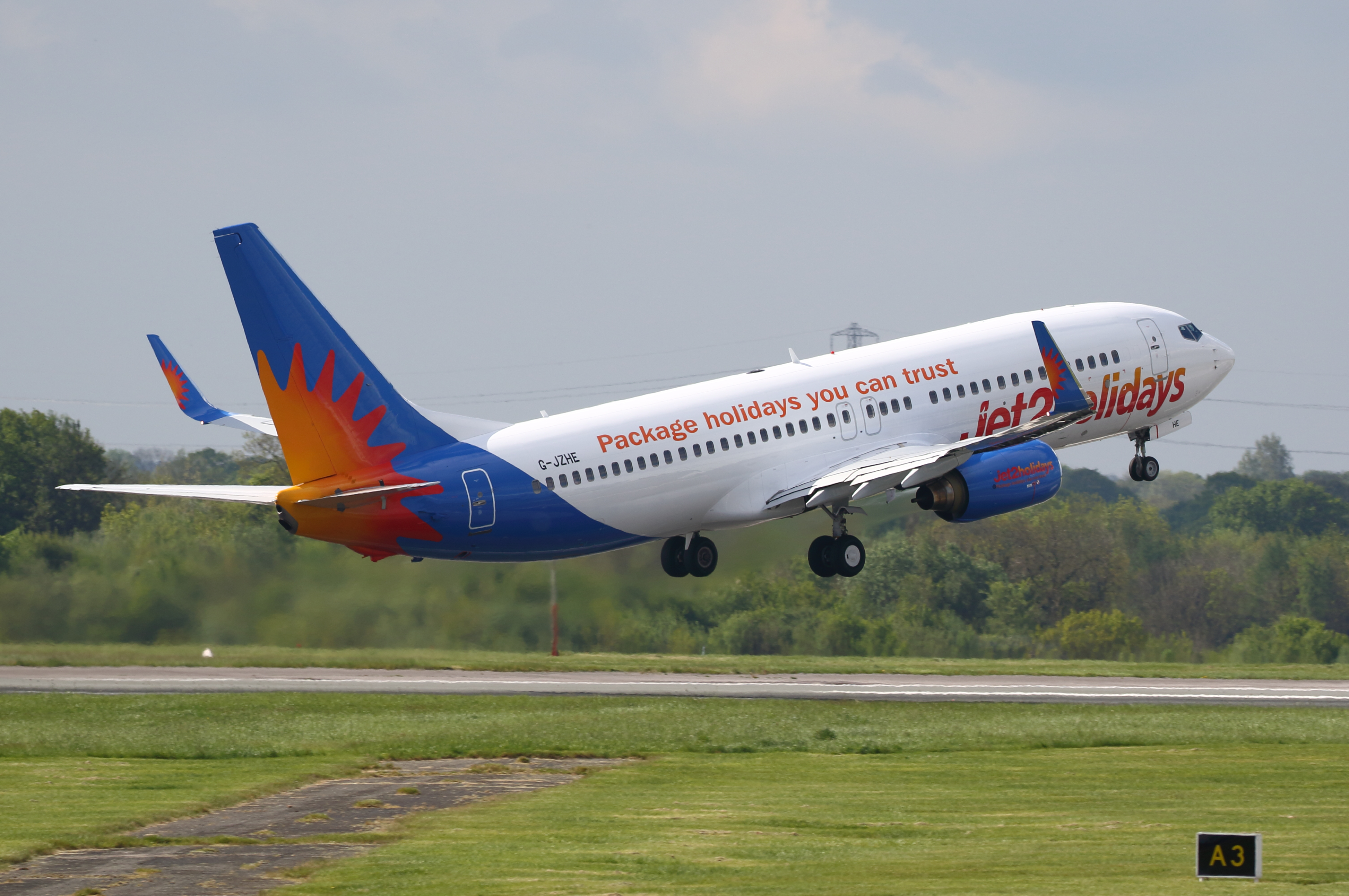 Jet 2 B737 G-JZHE